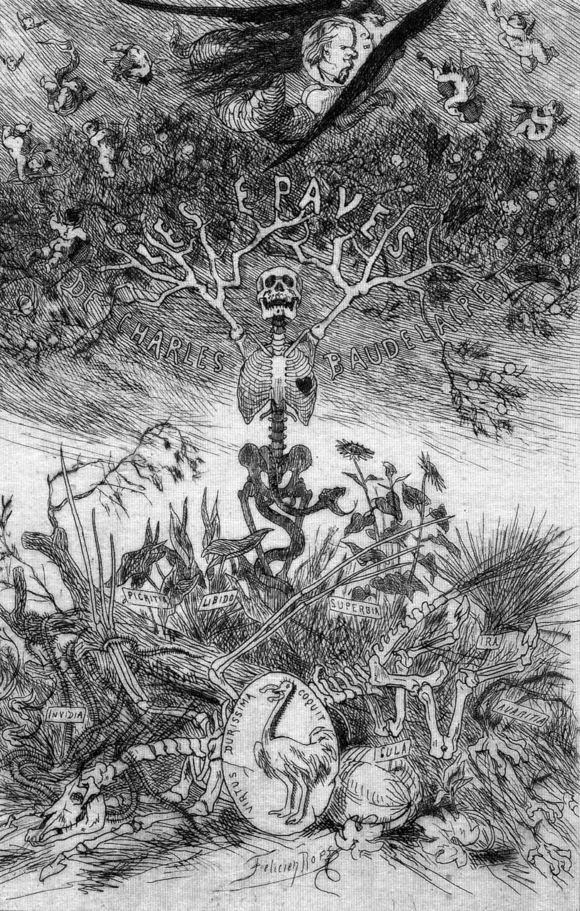 Illustration for Les Epaves by Charles Baudelaire